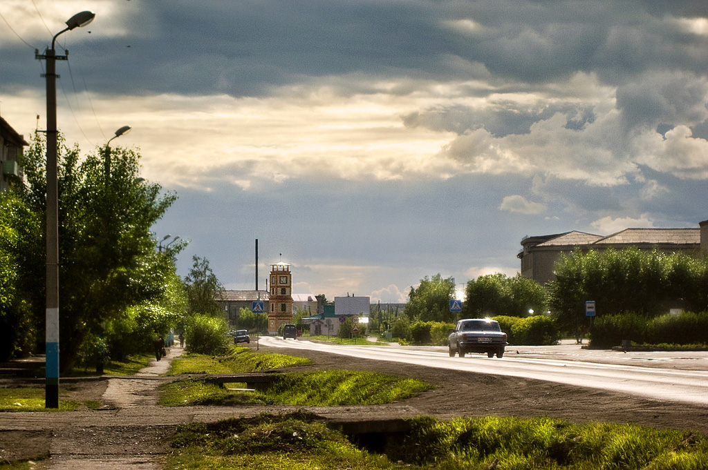 Татарск. Ул. Ленина